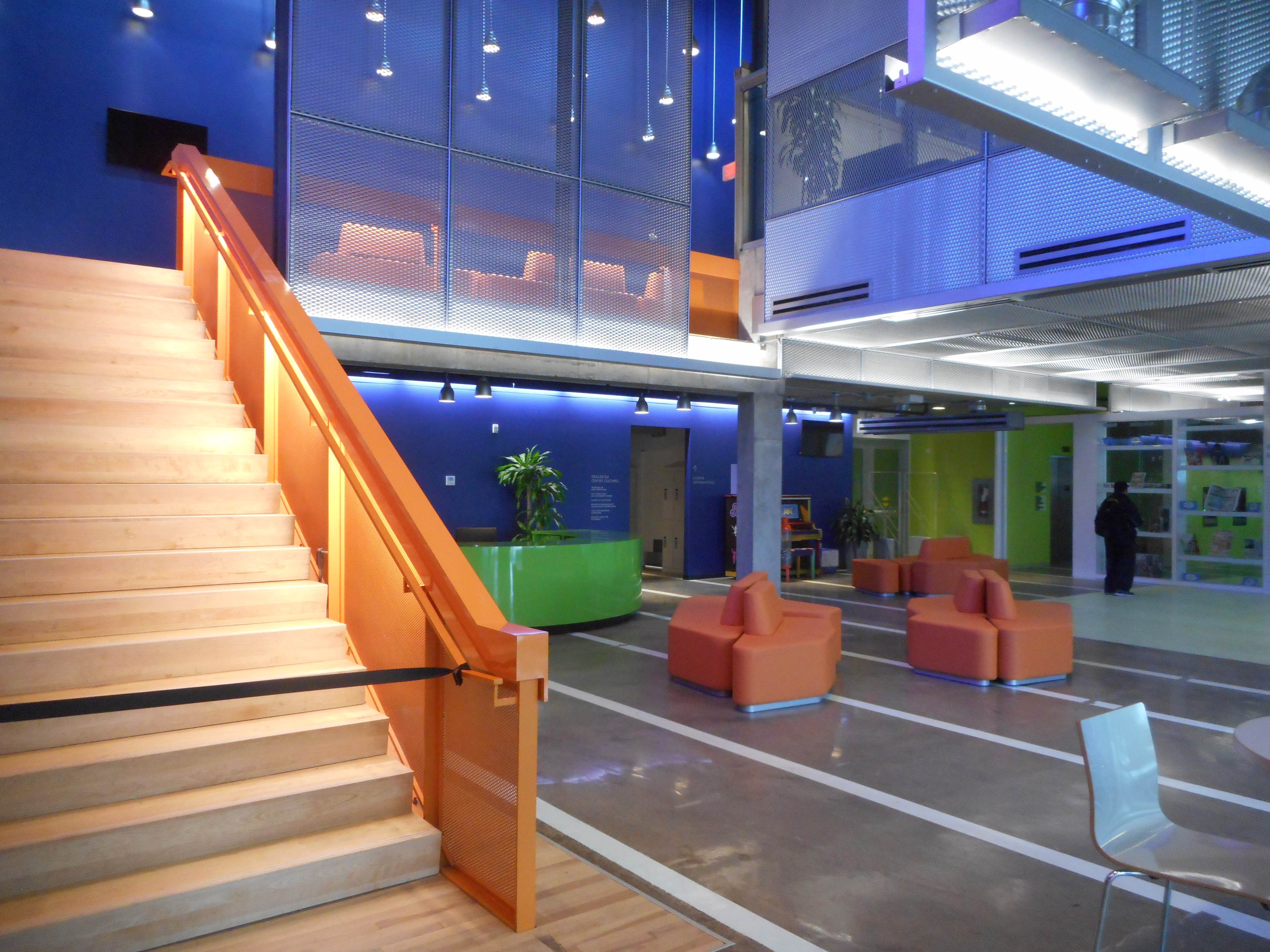 Centre culturel de Notre-Dame-de-Grâce, 6400, avenue de Monkland, Montréal